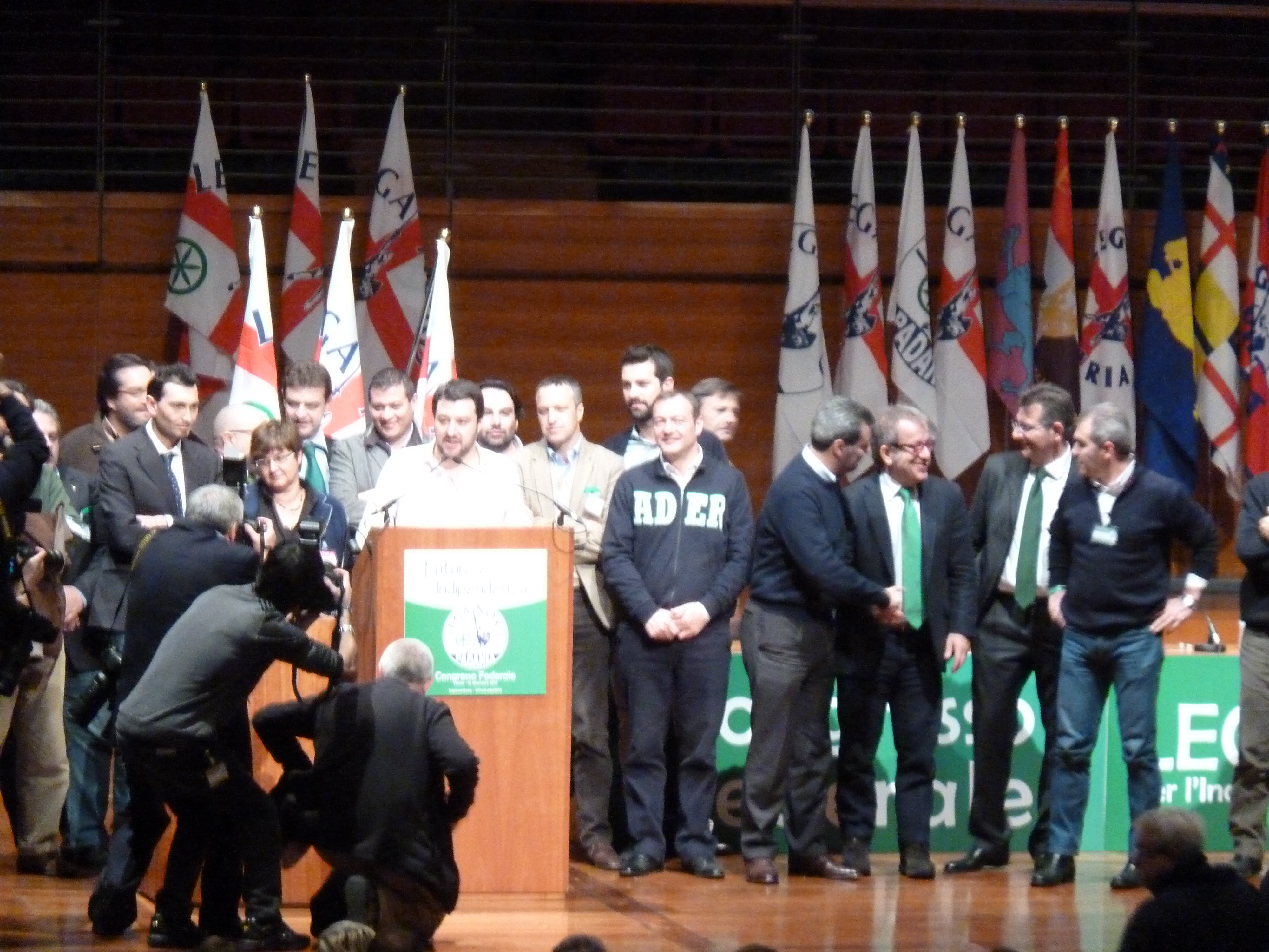 Congresso federale straordinario - Torino, 15 dicembre 2013. Discorso del candidato alla segreteria federale Matteo Salvini.